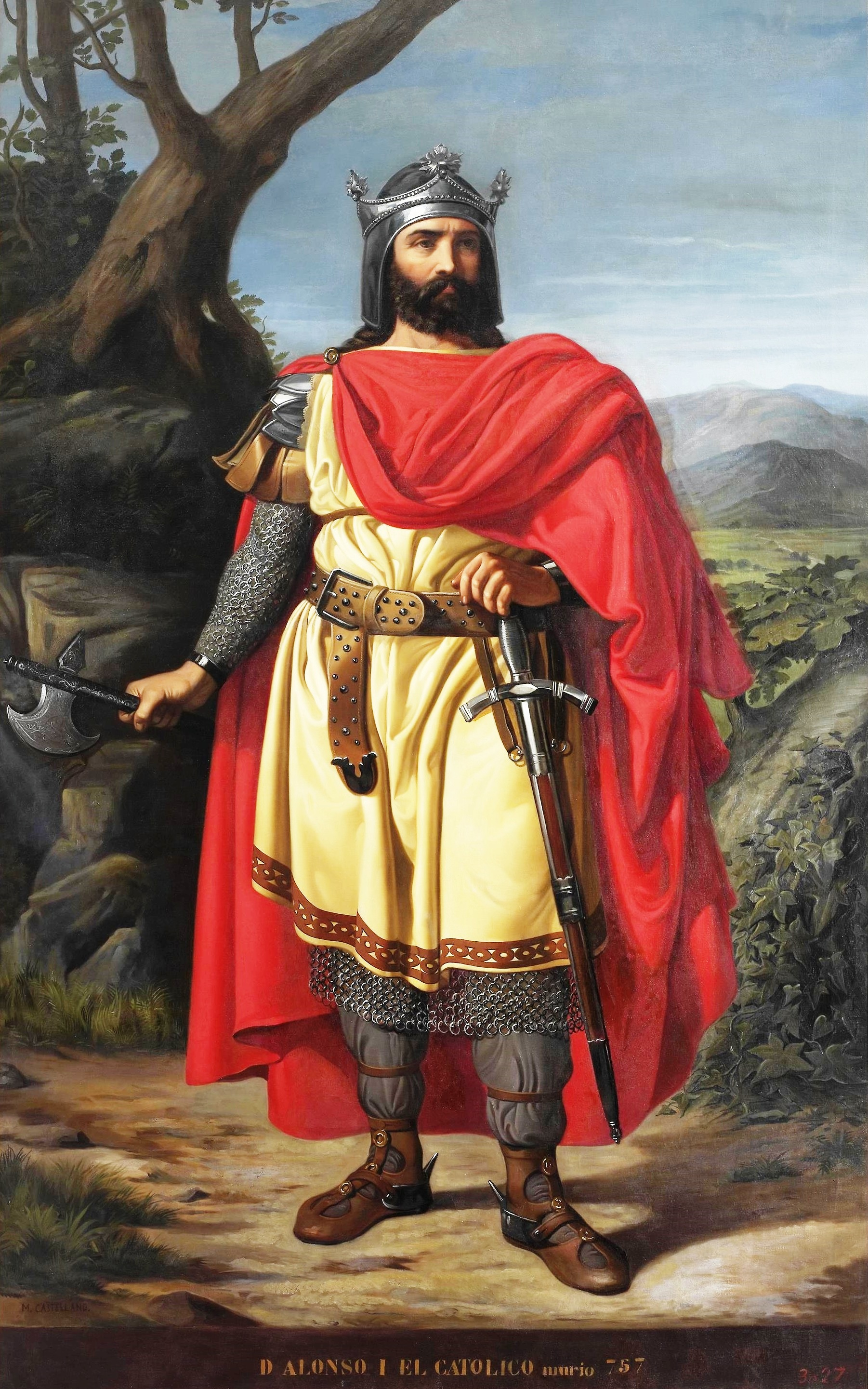 Retrato imaginario de Alfonso I el Católico (693-757), rey de Asturias e hijo de Pedro de Cantabria, duque de Cantabria. Sucedió en el trono a su cuñado, el rey Favila de Asturias, y fue sucedido a su vez por su hijo, el rey Fruela I de Asturias.